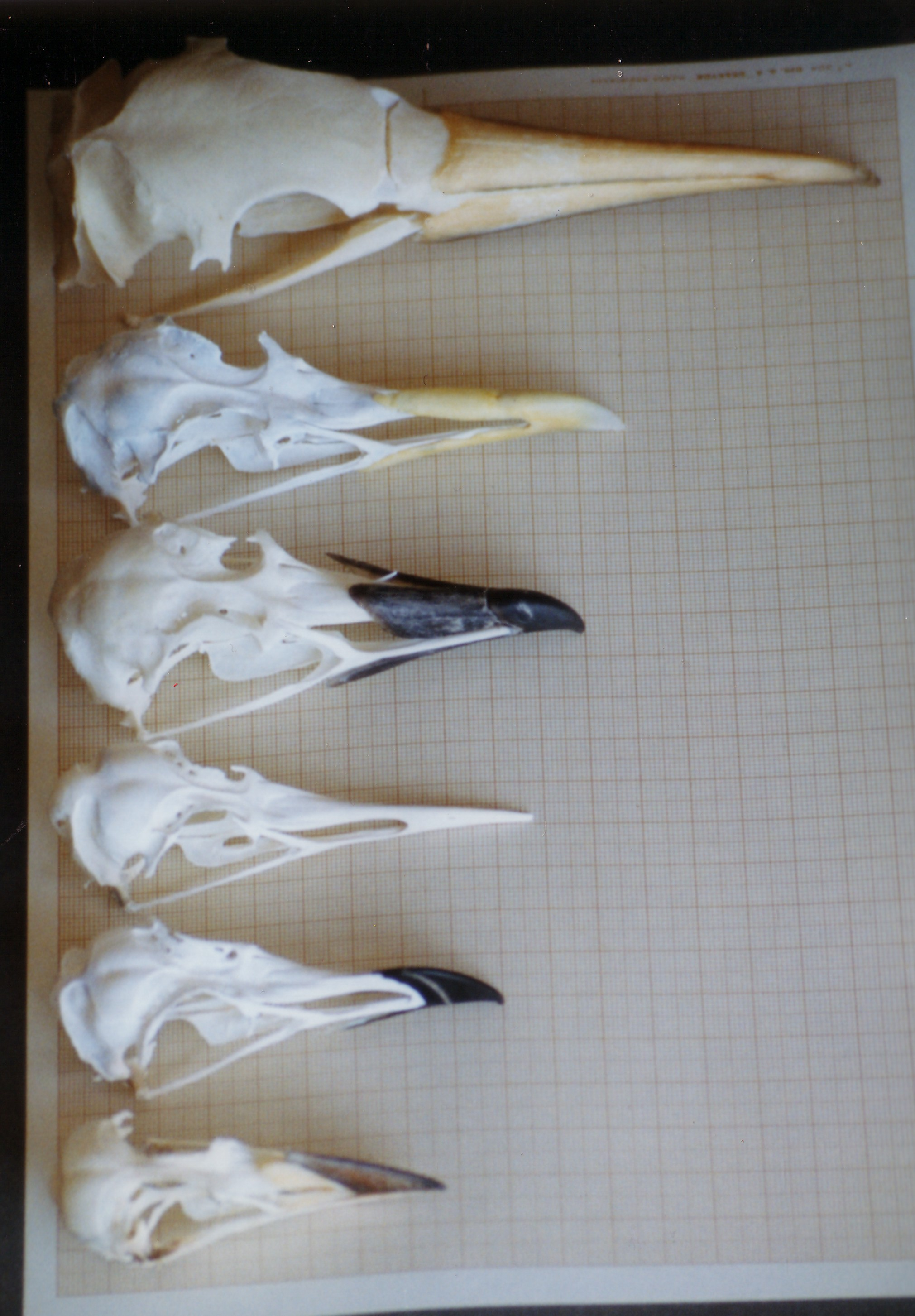 Cranios de aves mariñas. De maior a menor: mascato (Morus bassanus), gaivota (Larus michahellis), ave non identificada, arao dos cons (Uria aalge), arao romeiro (Alca torda) e arao papagaio (Fratercula arctica).